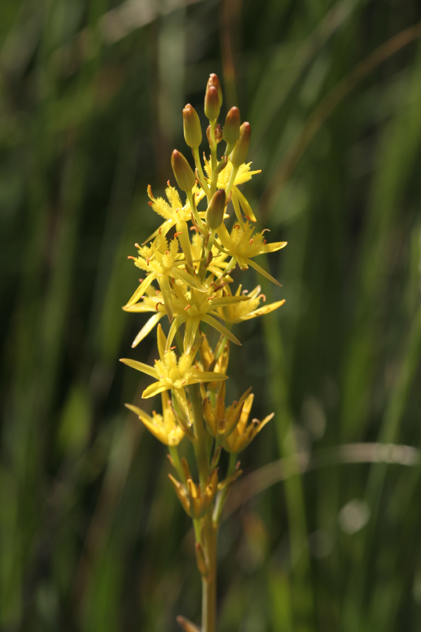 Narthécie des marais - fleurs